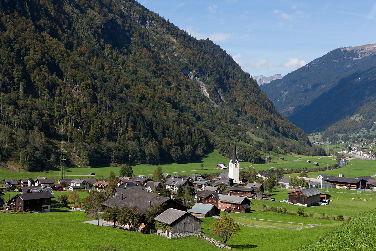 Matt (Gemeinde Glarus-Süd)